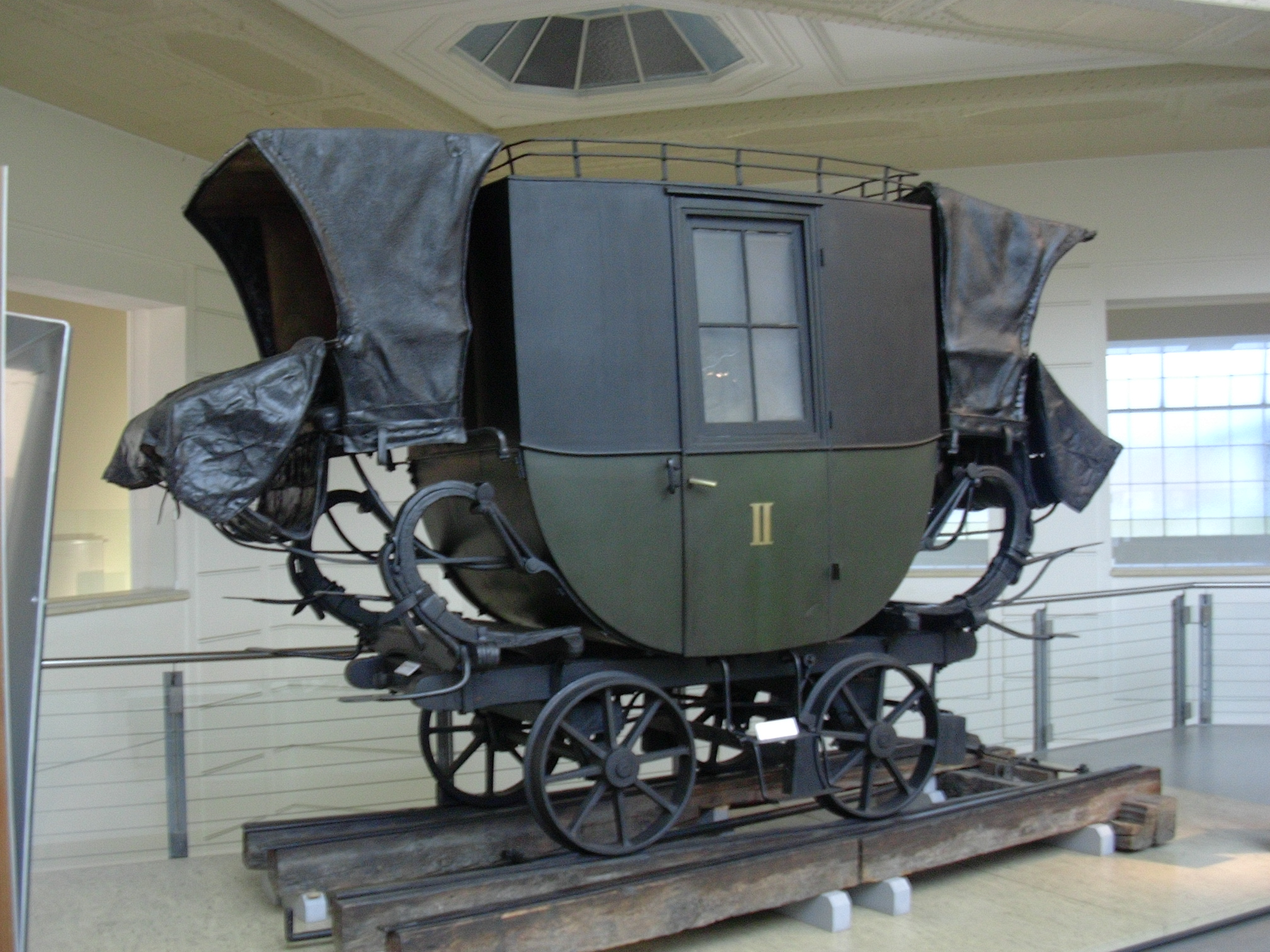 Personenwagen "Hannibal" der Pferdeeisenbahn Linz - Budweis, 1841